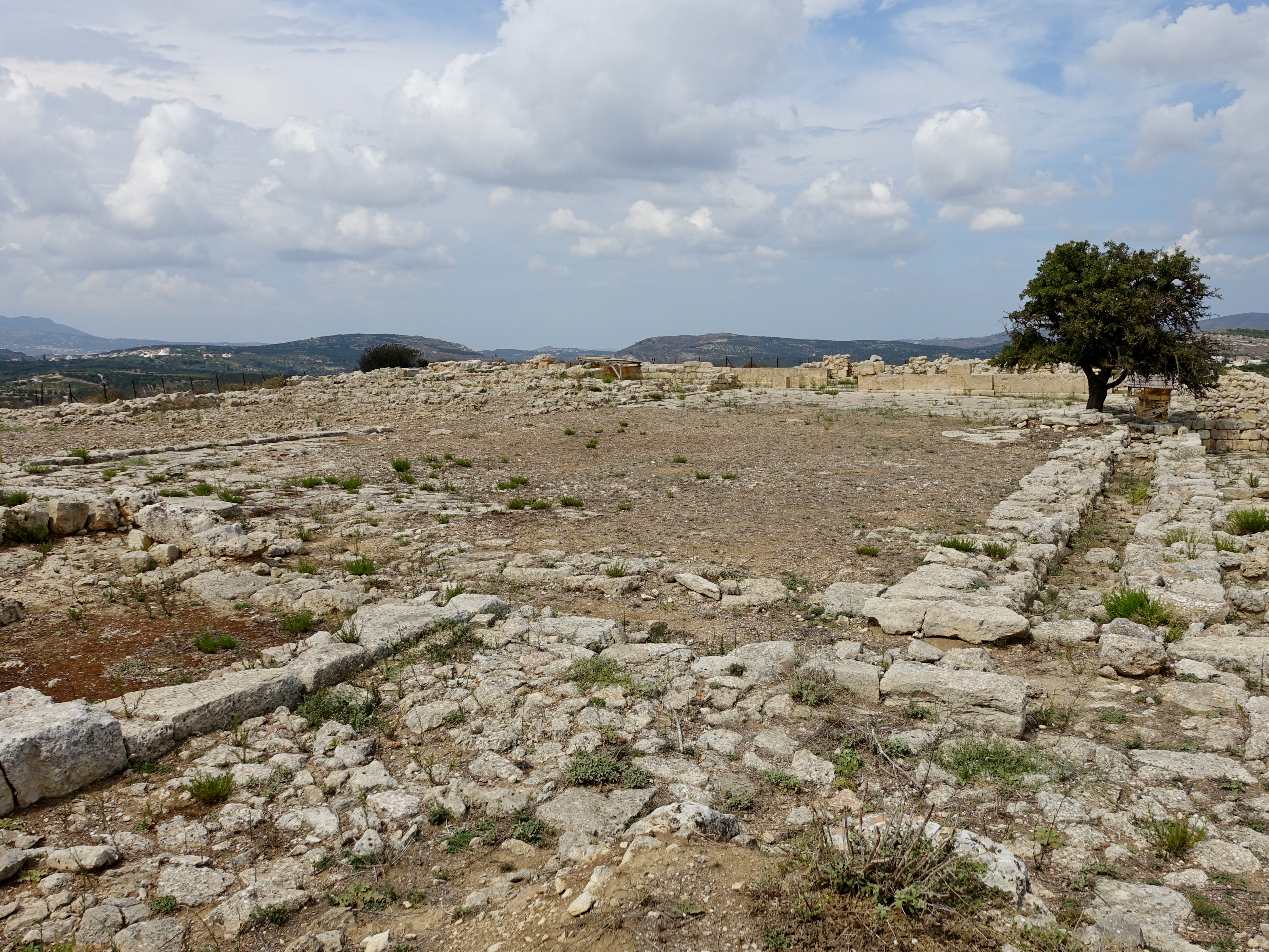 Palast von Galatas (Μινωικό Ανάκτορο του Γαλατά) nordwestlich von Arkalochori (Αρκαλοχώρι), Gemeinde Minoa Pediada, Kreta, Griechenland